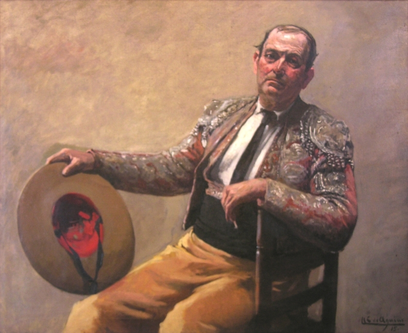 "Picador Sentado" óleo sobre lienzo de 105 x 109 cm que se encuentra en el Museo de artes y costumbres populares de Sevilla